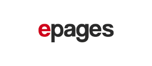 Firmenlogo ePages